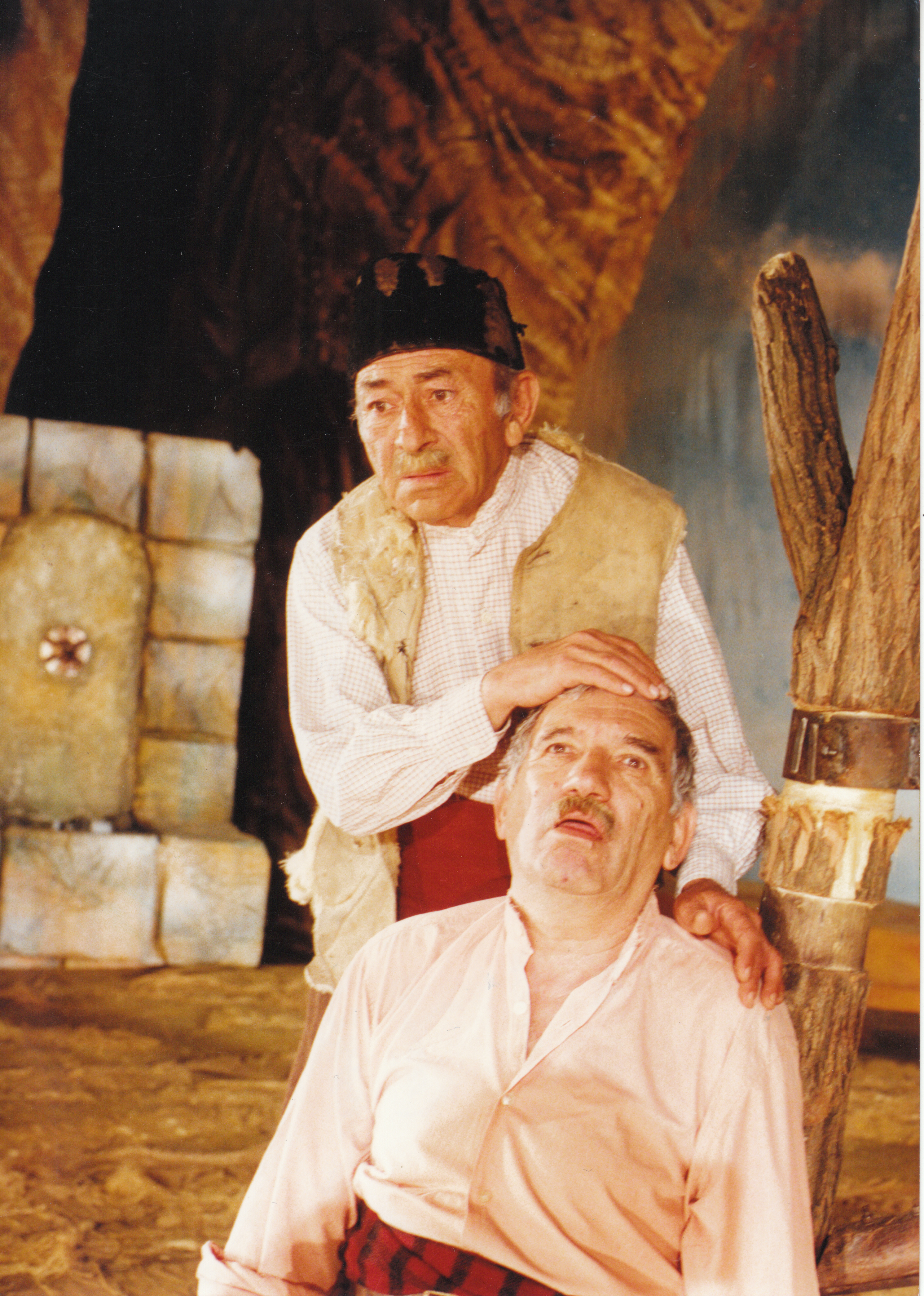 „Гераците“ - режисьор Любомир Дековски, Васил Попилиев в ролята на Йордан Герака и Минко Минков в ролята на Матей Маргалака